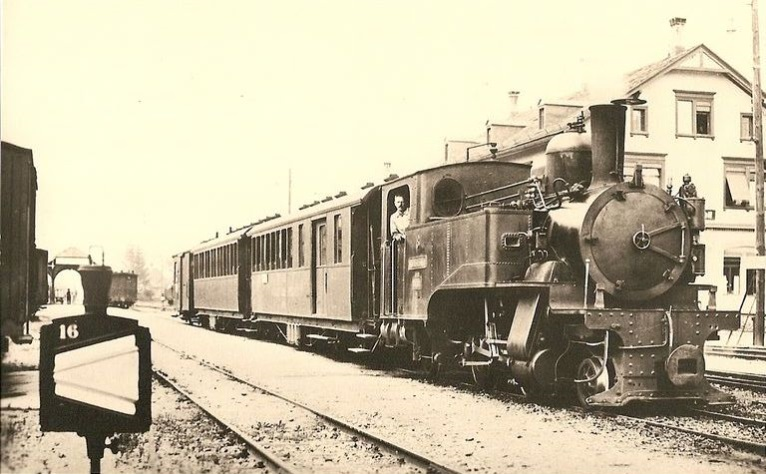 HG 2/4 Nr. 8 „Fröhlichsegg“ der Appenzeller-Strassenbahn (ASt) mit den Wagen CF4, BC4 und Z in Appenzell